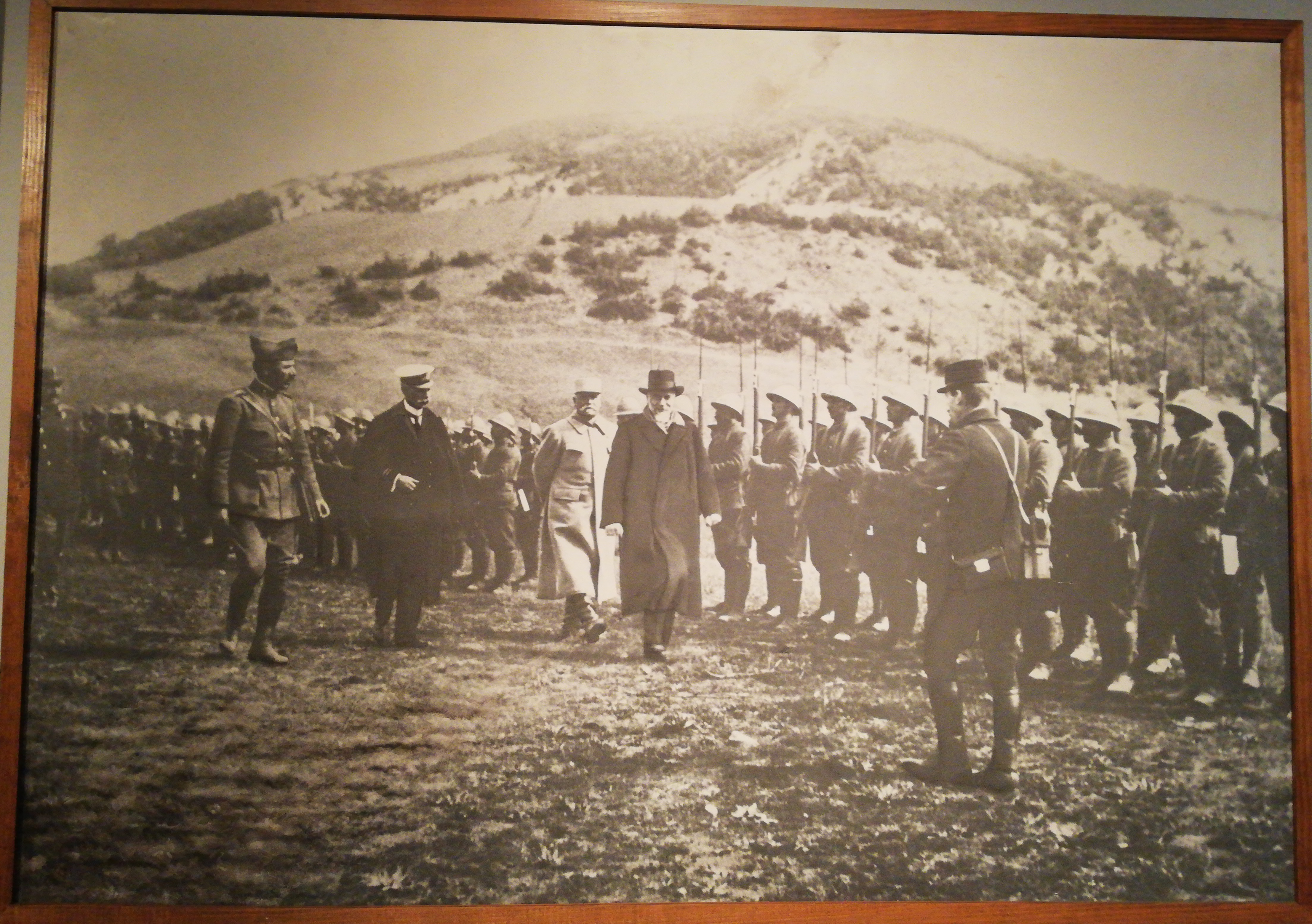 Général Régnault, Eleftherios Venizelos et Pavlos Koundouriotis passant en revue l'armée grecque sur le front macédonien, mai 1918.